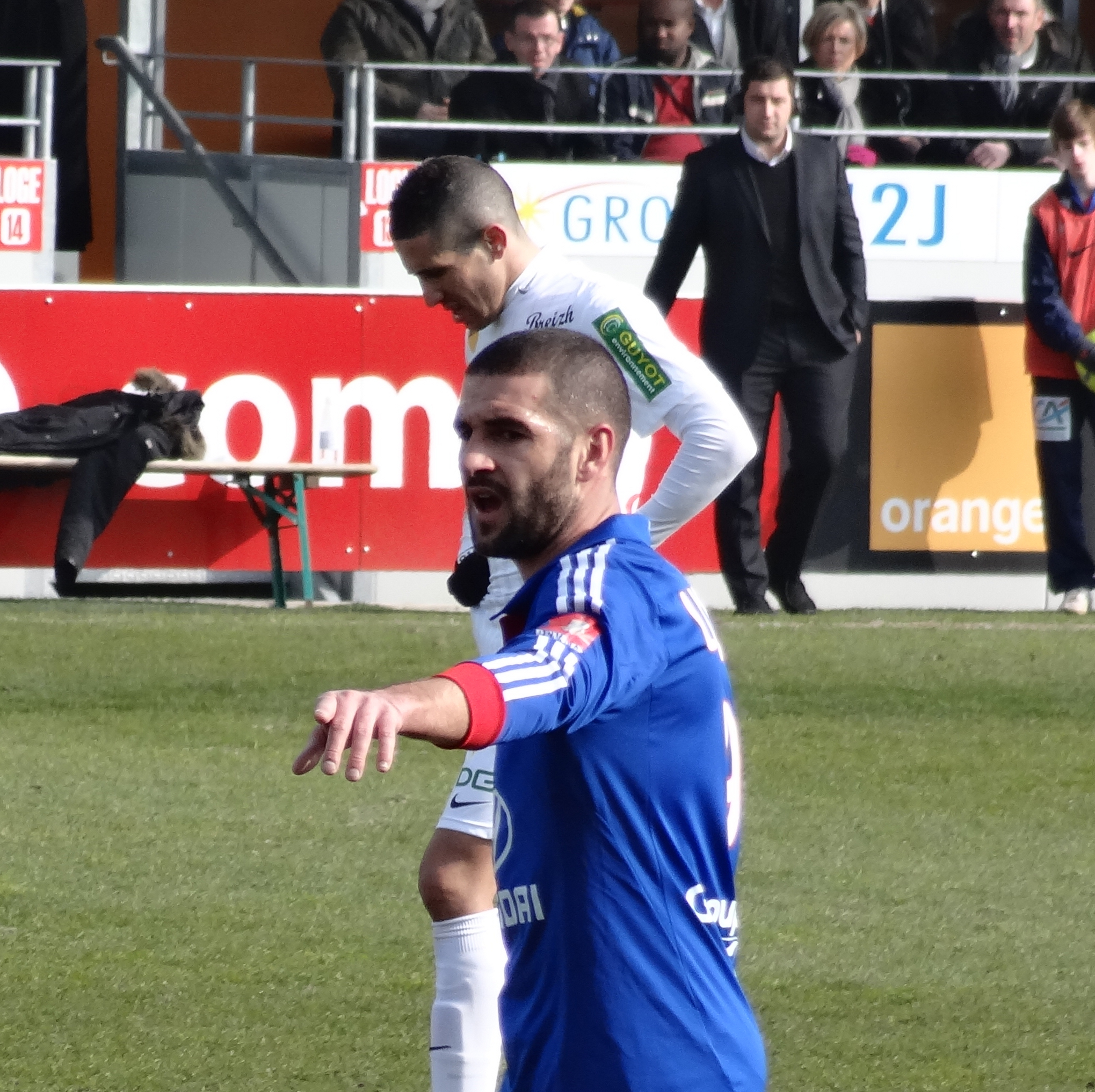 Match de football (Ligue 1) entre le Stade brestois 29 et l'Olympique lyonnais, le 3 mars 2013